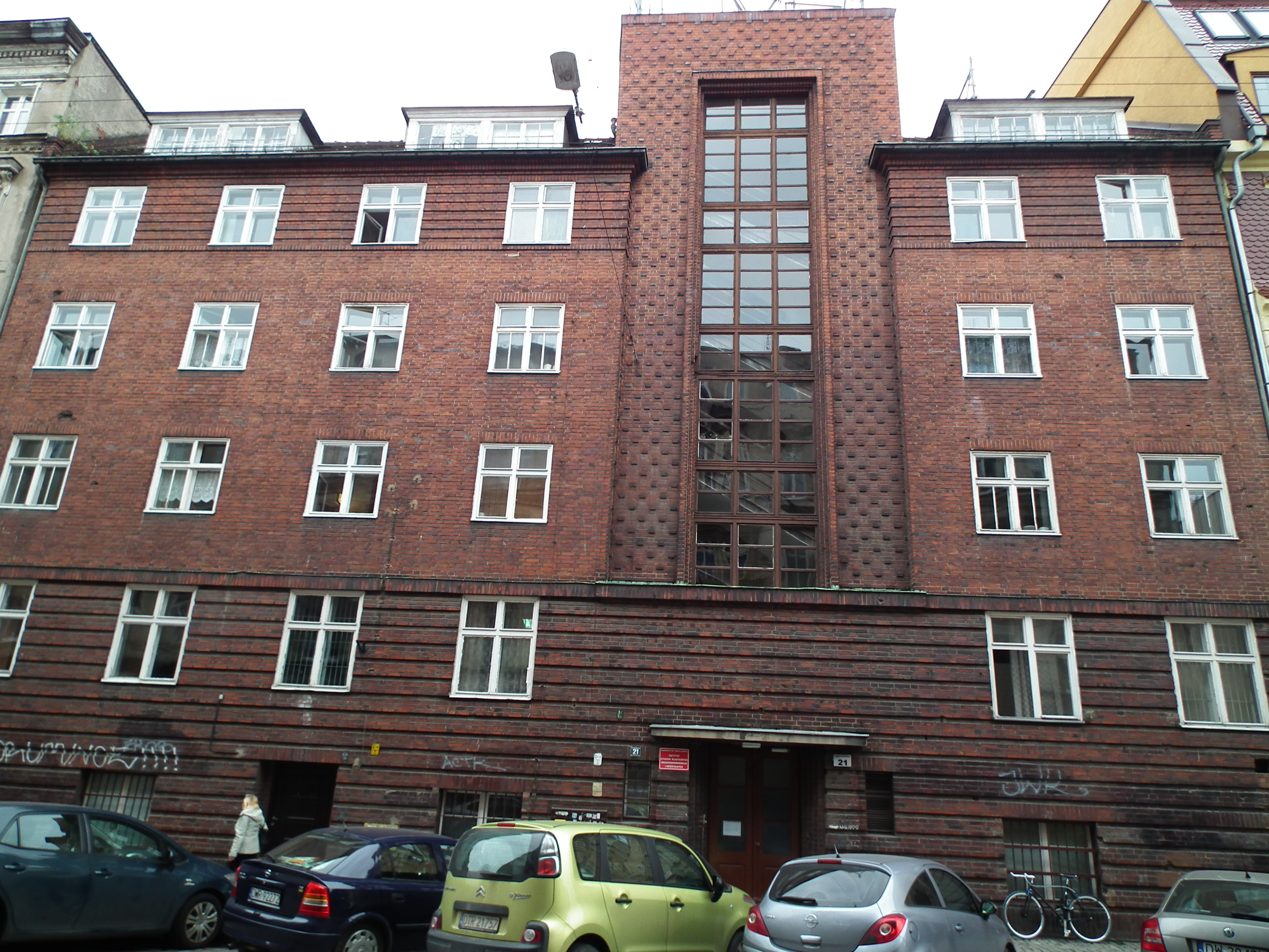 Dom Śląskiego Towarzystwa Dziewcząt Ewangelickich, Wrocław, ul. Komuny Paryskiej 21, obecnie Instytut Studiów Klasycznych, Śródziemnomorskich i Orientalnych UW. Architekt - Richard Gaze.